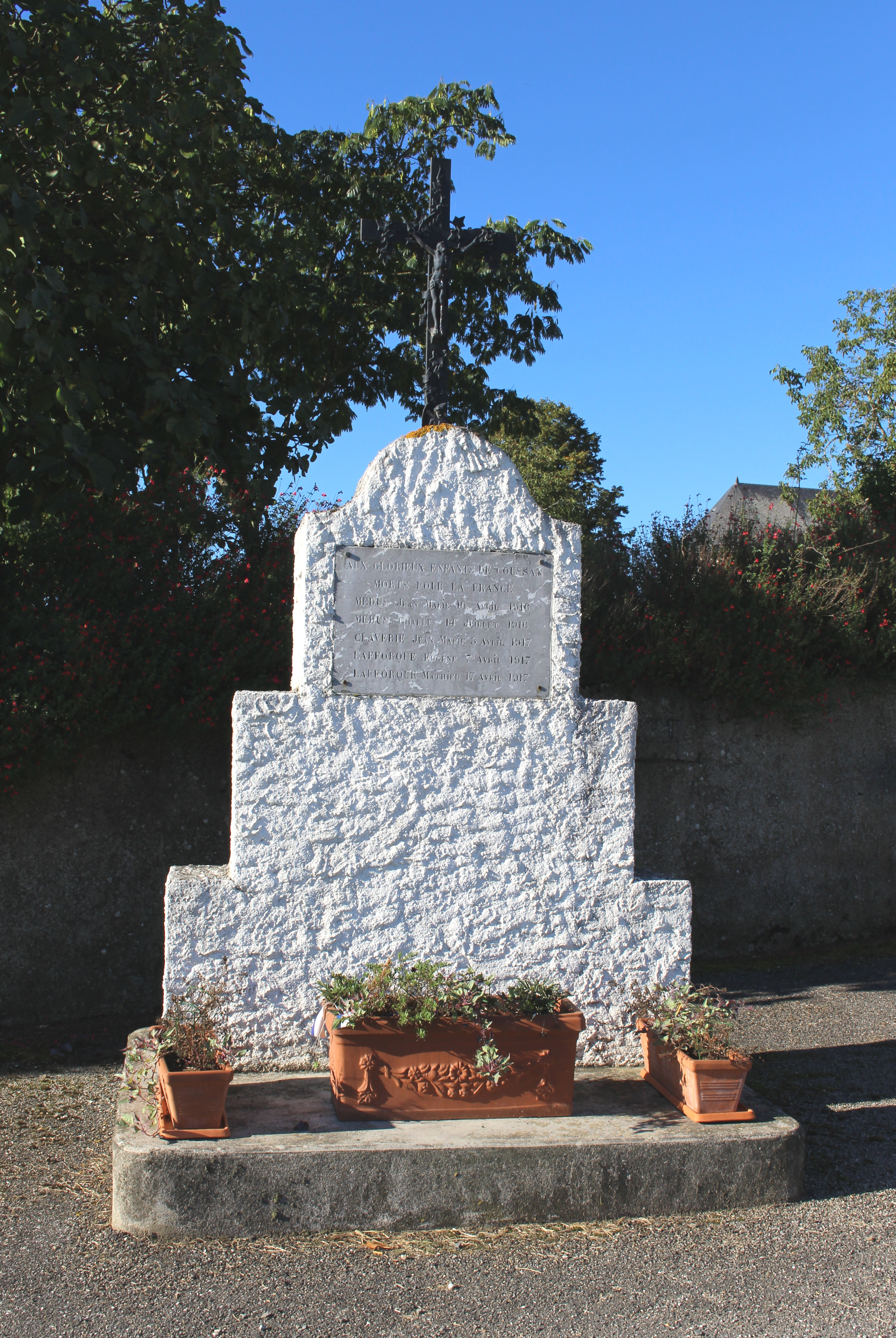 Monument aux morts de Coussan (Hautes-Pyrénées)